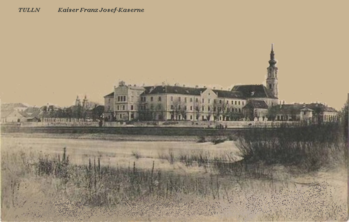 Tulln Kaiser Franz Josef-Kaserne